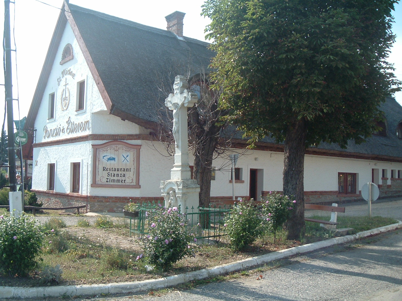 Resturant in Vasszentmihály. - St. Michael Panzió és Étterem Vasszentmihály Fõ út 48